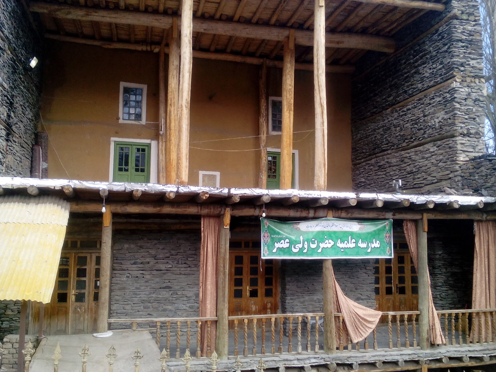 مسجد تاریخی ازغد